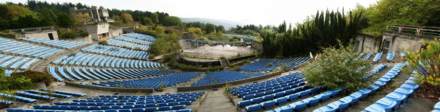 Anfiteatro Auditorio Parque de Atracciones de Vizcaya